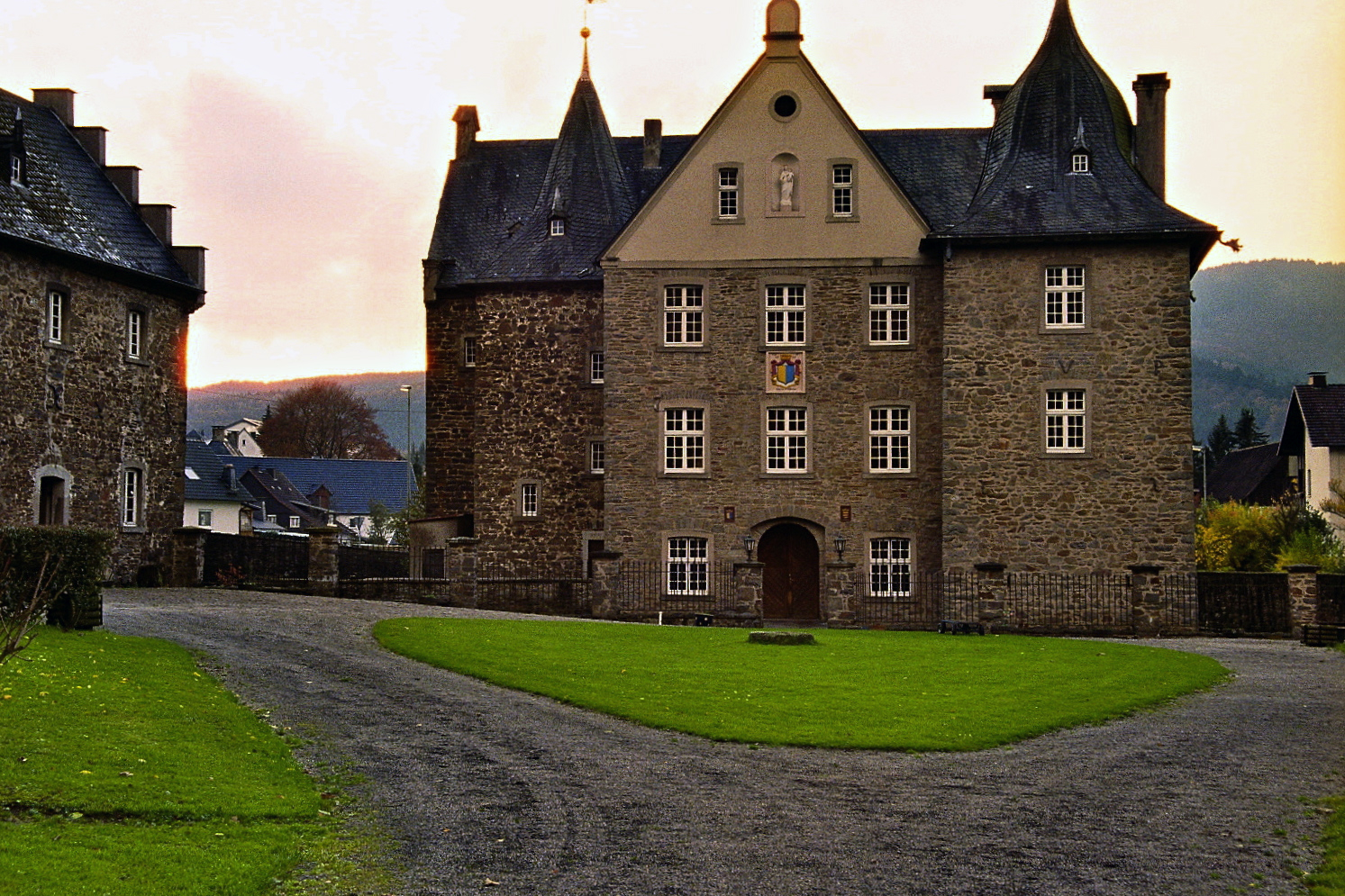 Die weitgehend unbekannte Baugeschichte des Schlosses beginnt um 1457 als Familiensitz einer Adelsfamilie. Die aus Bruchstein gebaute Anlage mit drei Türmen ist von einem Wassergraben (Gräfte) umgeben und besitzt eine Vorburg. Das denkmalgeschützte Schloss ist seit 1457 Stammsitz der Familie 'von Plettenberg-Lenhausen'. Es befindet sich in Finnentrop, Ortsteil Lenhausen im Sauerland, NRW. Die Aufnahmen wurden von mir im Herbst 2005 mit einer Nikon F5 gemacht. Johannes Heribert Pohl